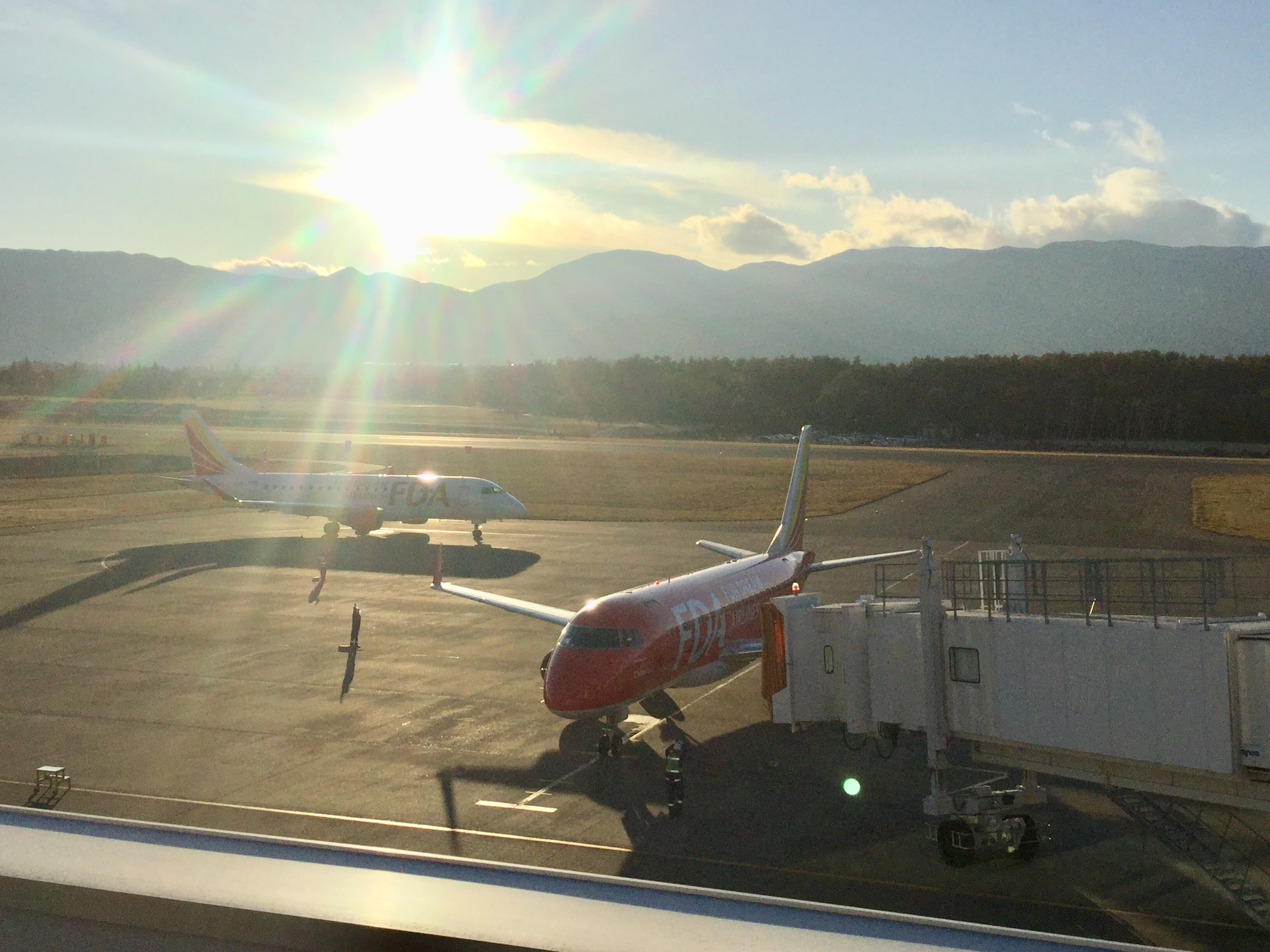 2020年1月2日、信州まつもと空港のエプロンに2機。